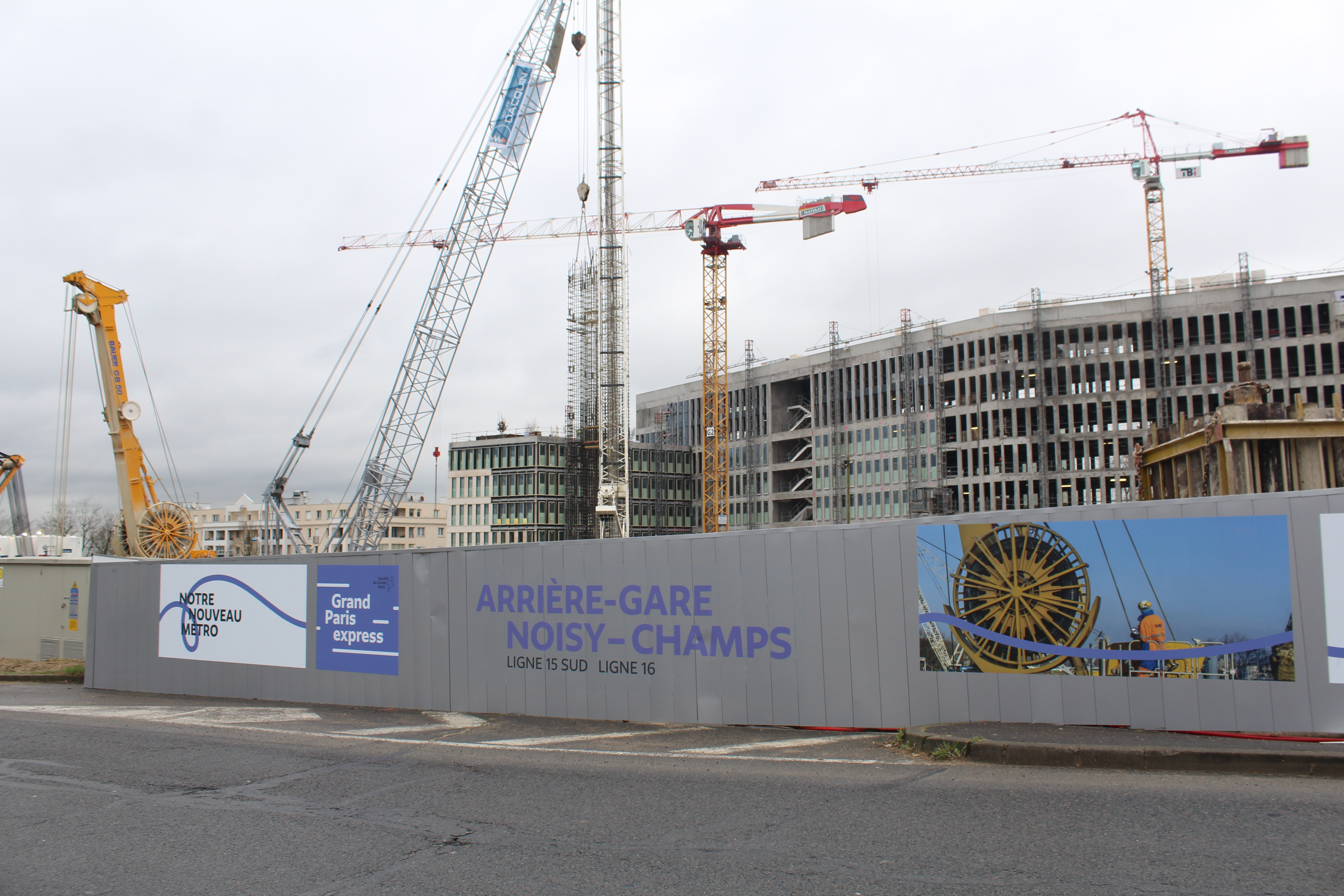 Chantier de la ligne 16 du métro parisien à Champs-sur-Marne au nord de la gare de Noisy-Champs.